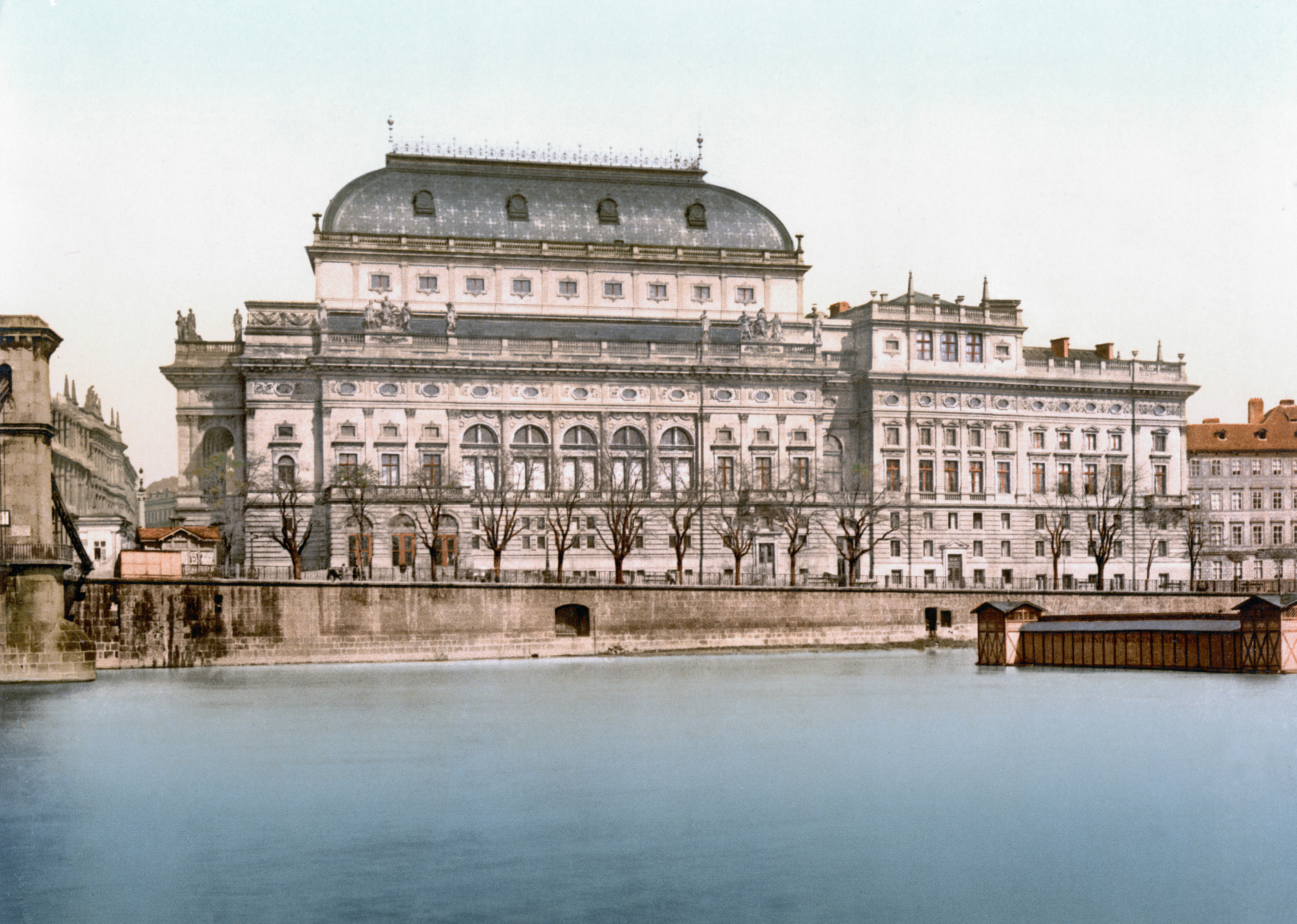 Národní divadlo v Praze před rokem 1898 (vlevo patrný pilíř řetězového mostu).